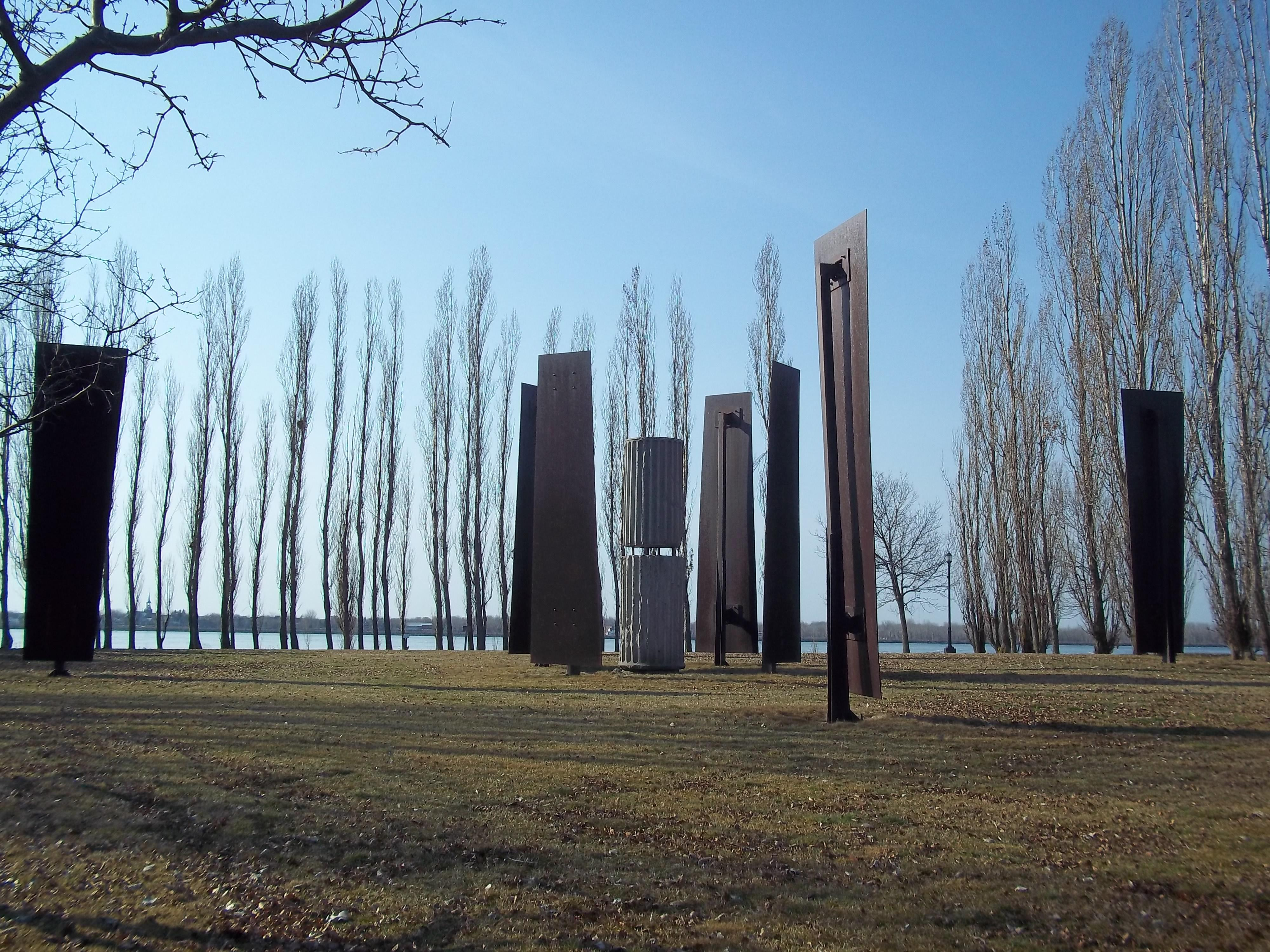 Sculpture d'André Fournelle intitulée La Ville blanche, de 1986. Elle est située au parc René-Lévesque, à Lachine.